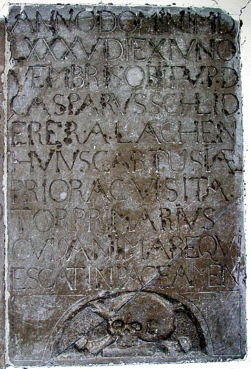 Epitaph des ehemaligen Priors Casparus Schliederer der Reichskartause Buxheim im oberschwäbischen Buxheim bei Memmingen. Prior von 1575 bis 1585. Heute im Kreuzgang des Klosters, früher im Brüderchor von St. Maria.